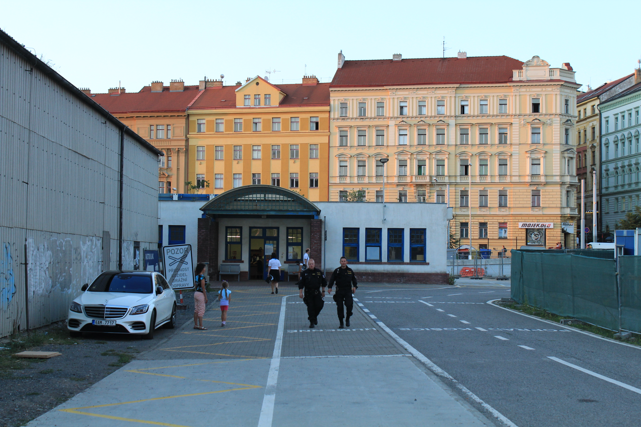 Praha hlavní nádraží budova terminálu autovlaků